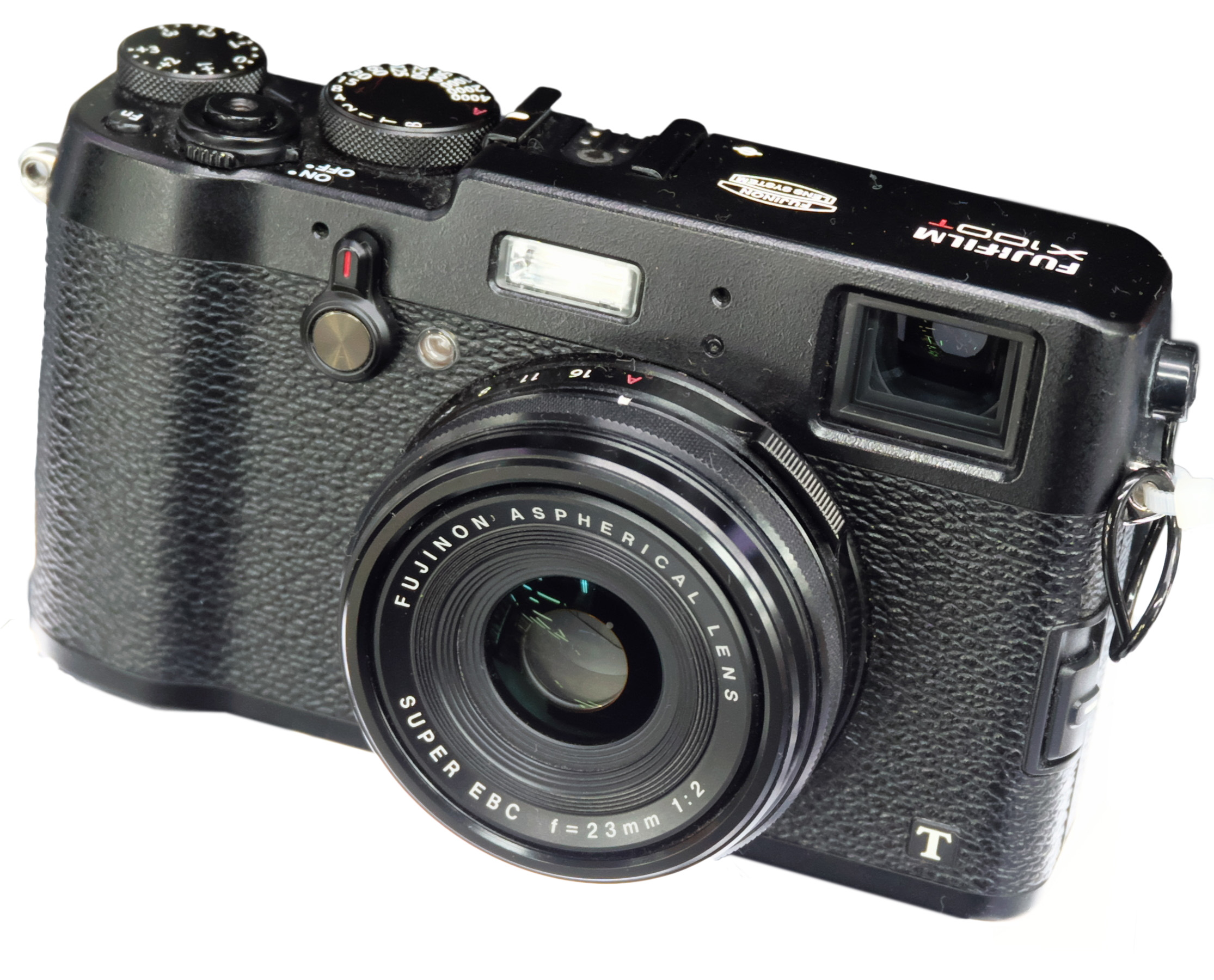 FUJIFILM X100T（ヨドバシカメラにて撮影）